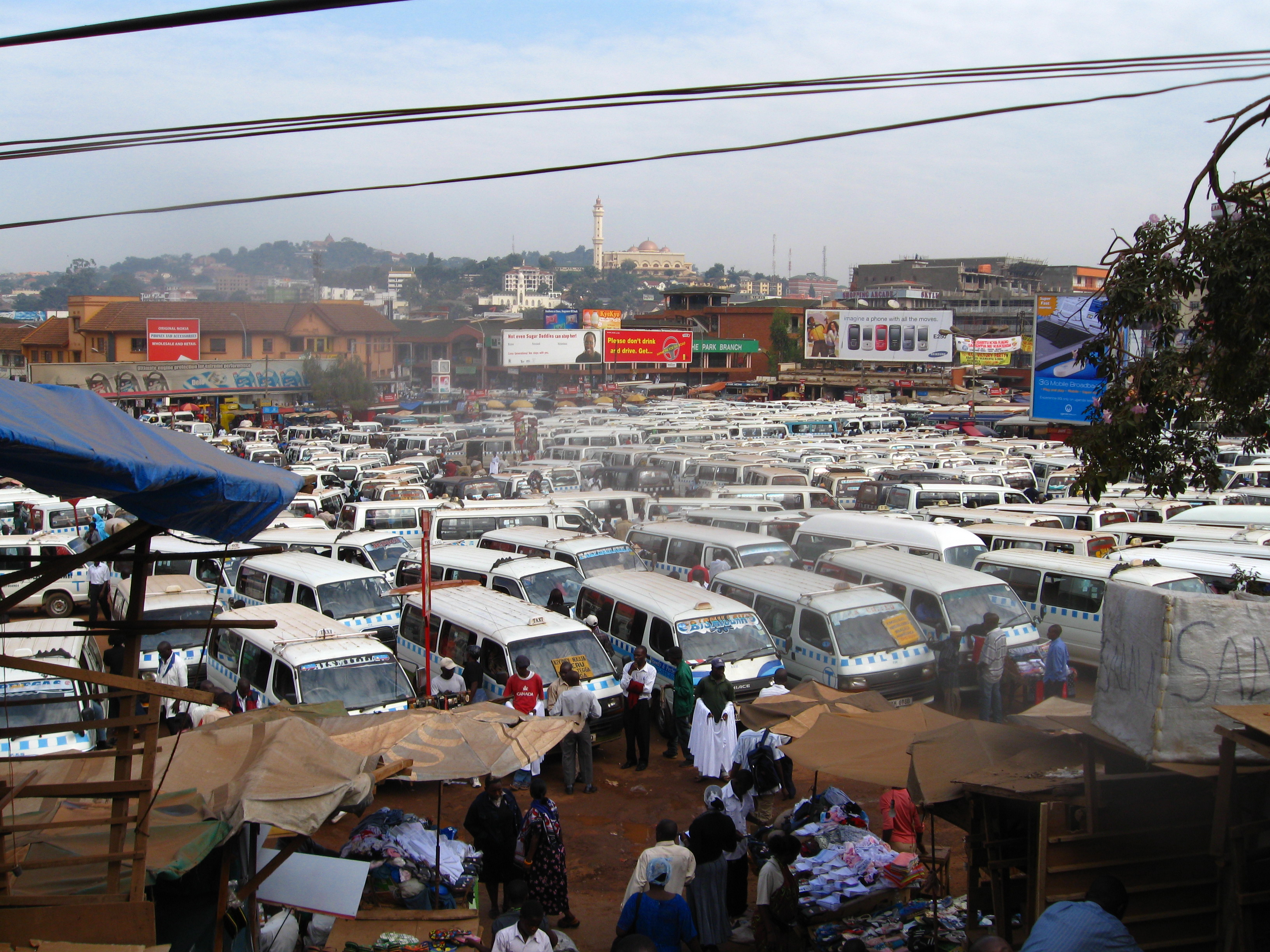 Taxis in Kampala, Uganda